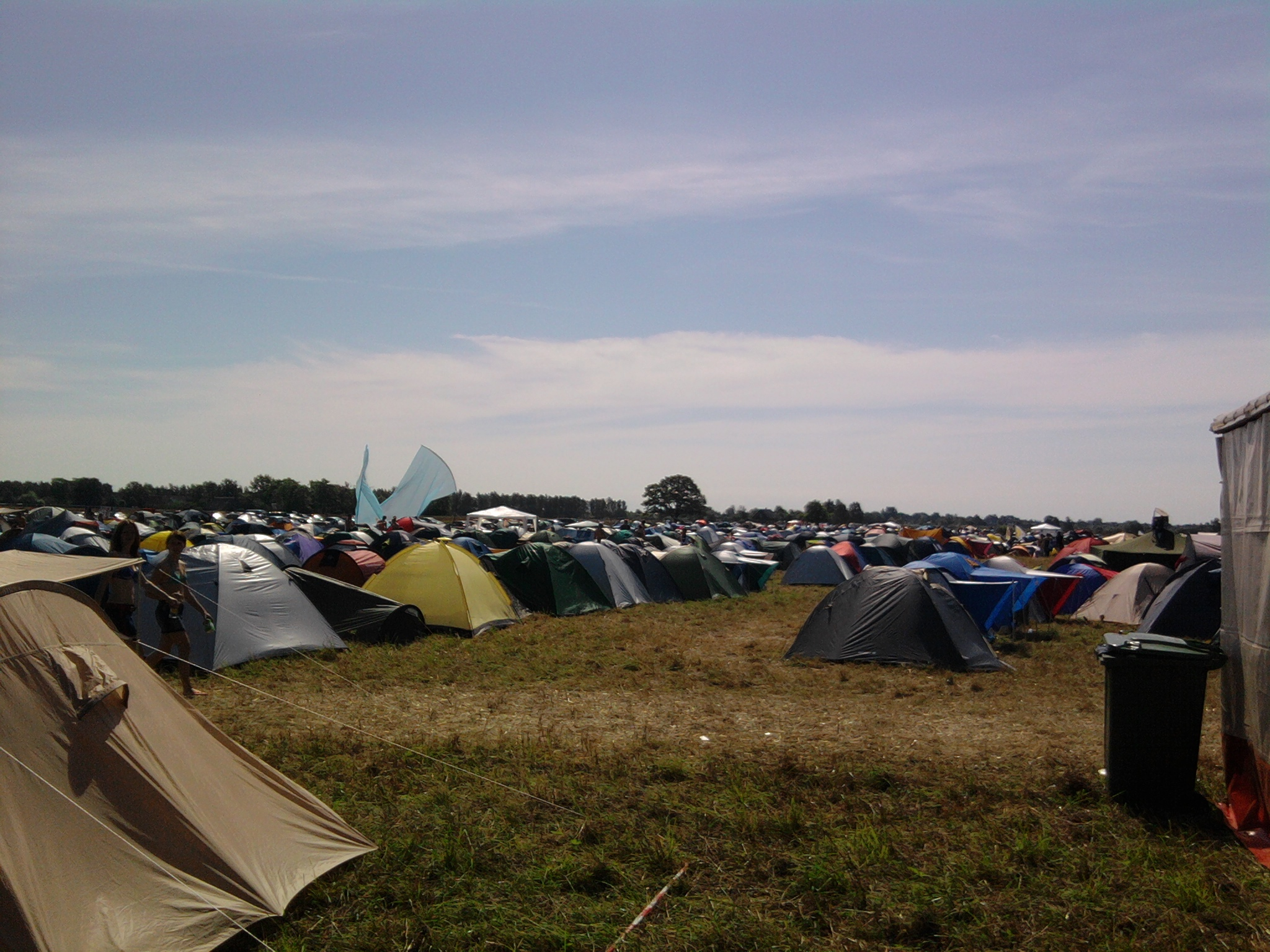 Positivus 09 Camping